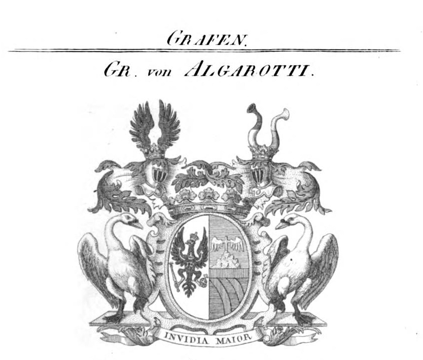 Algarotti - Tyroff HA.jpg